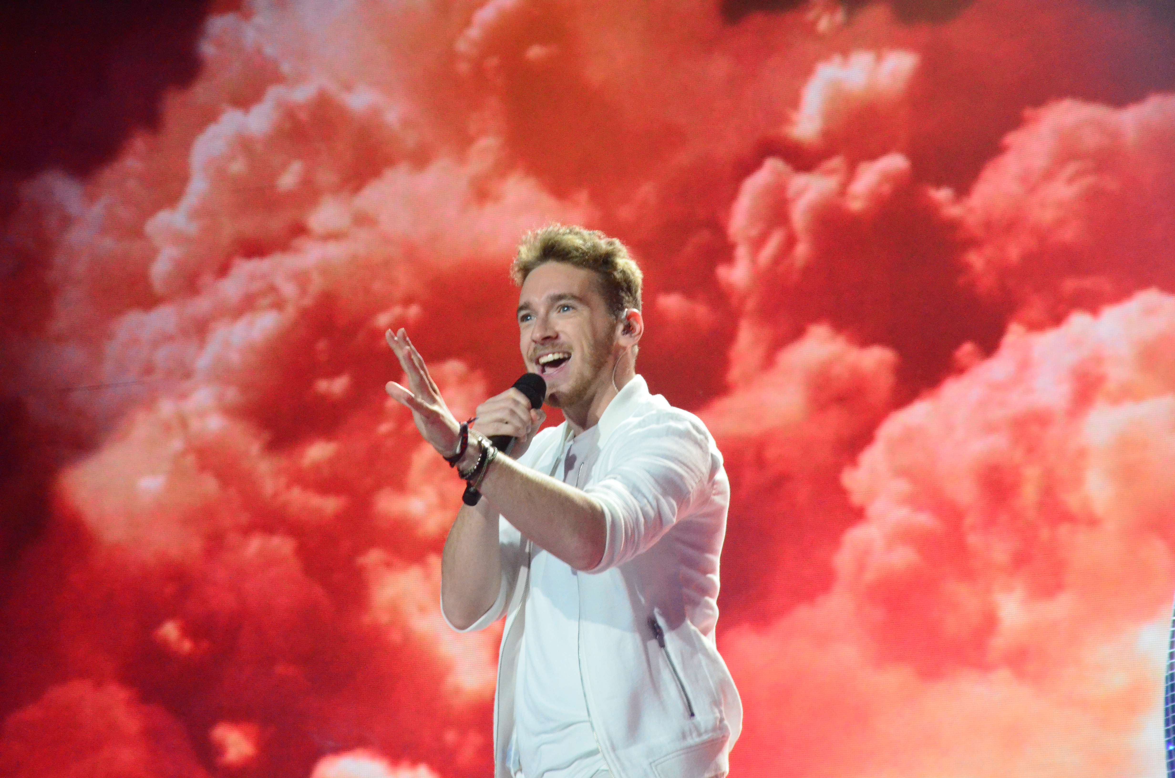 12 травня. Генеральна репетиція фіналу Євробачення 2017. Nathan Trent, Austria.